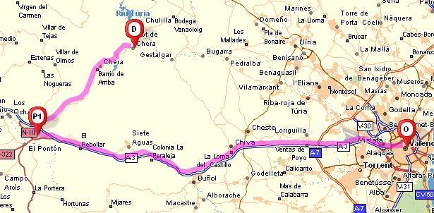 Acceso nº 2 para llegar a Sot de Chera (Valencia, España)